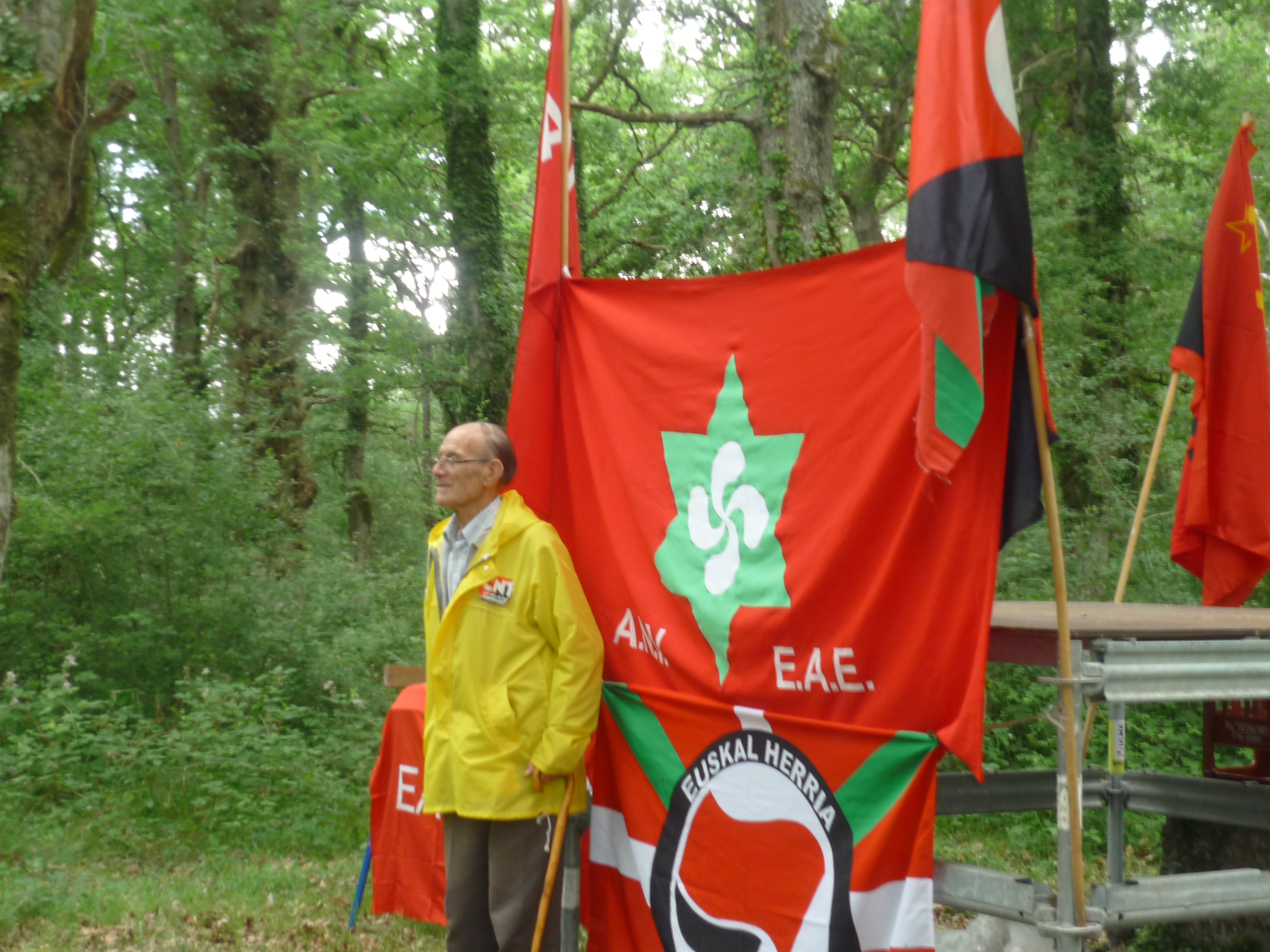 Felix Padin 2012ko Albertia egunean jasotako omenaldian